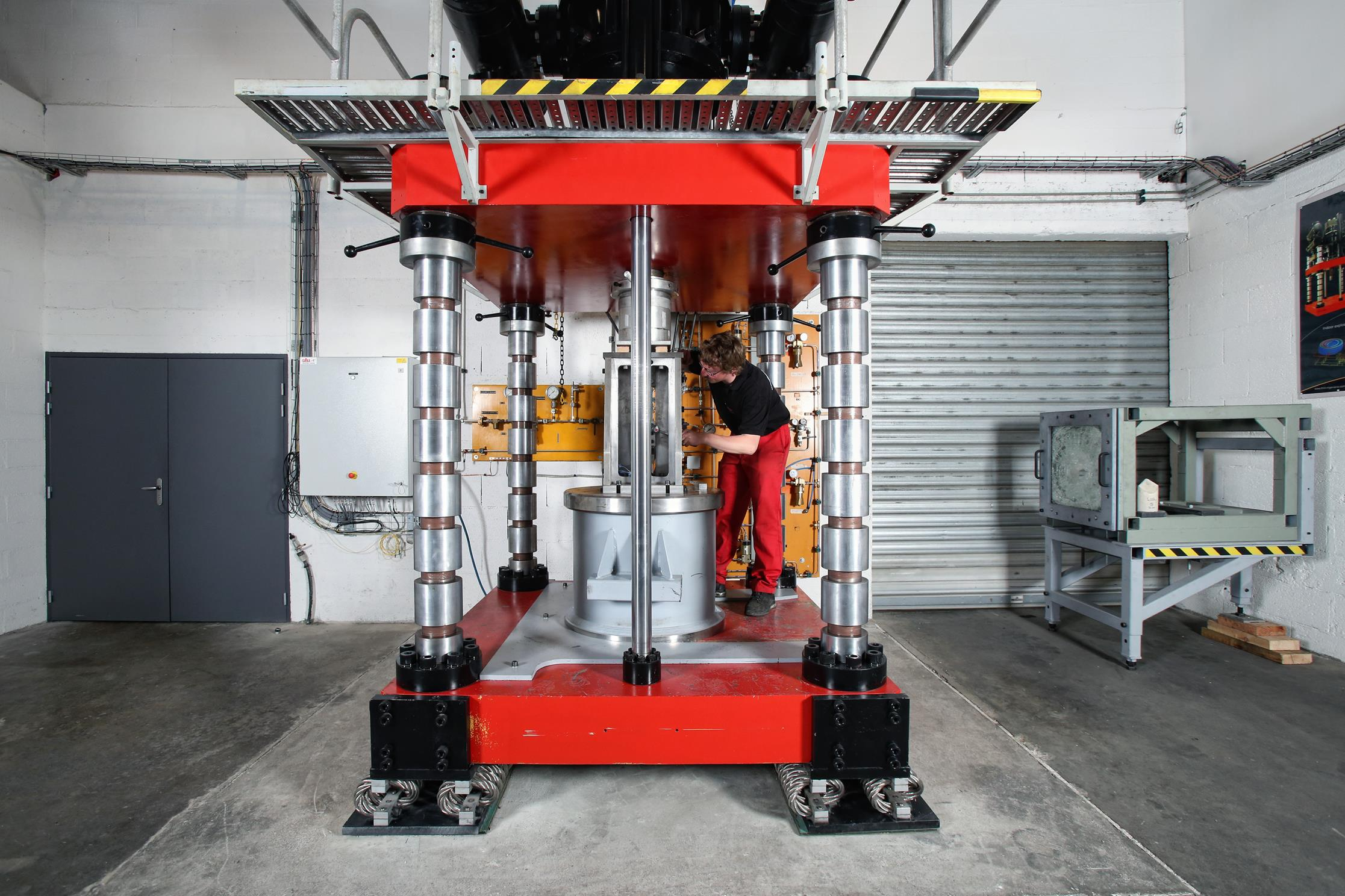 JUPITER